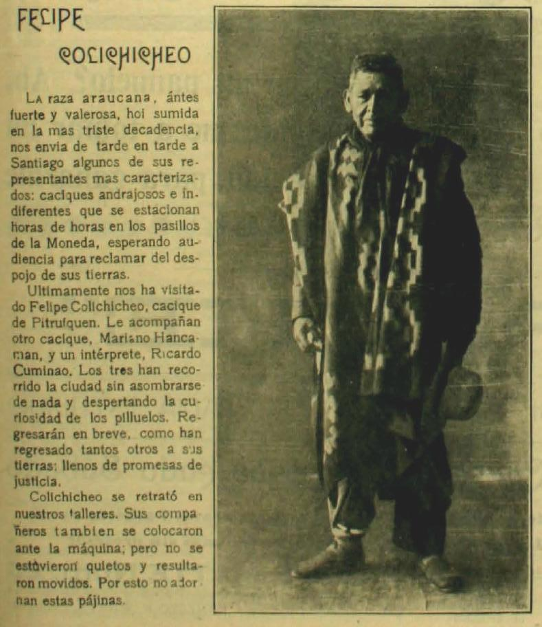 Nota de Revista ZigZag que habla del Cacique Felipe Colichicheo de Pitrufquén, en su visita a Santiago, para reclamar en La Moneda por el despojo de sus tierras.